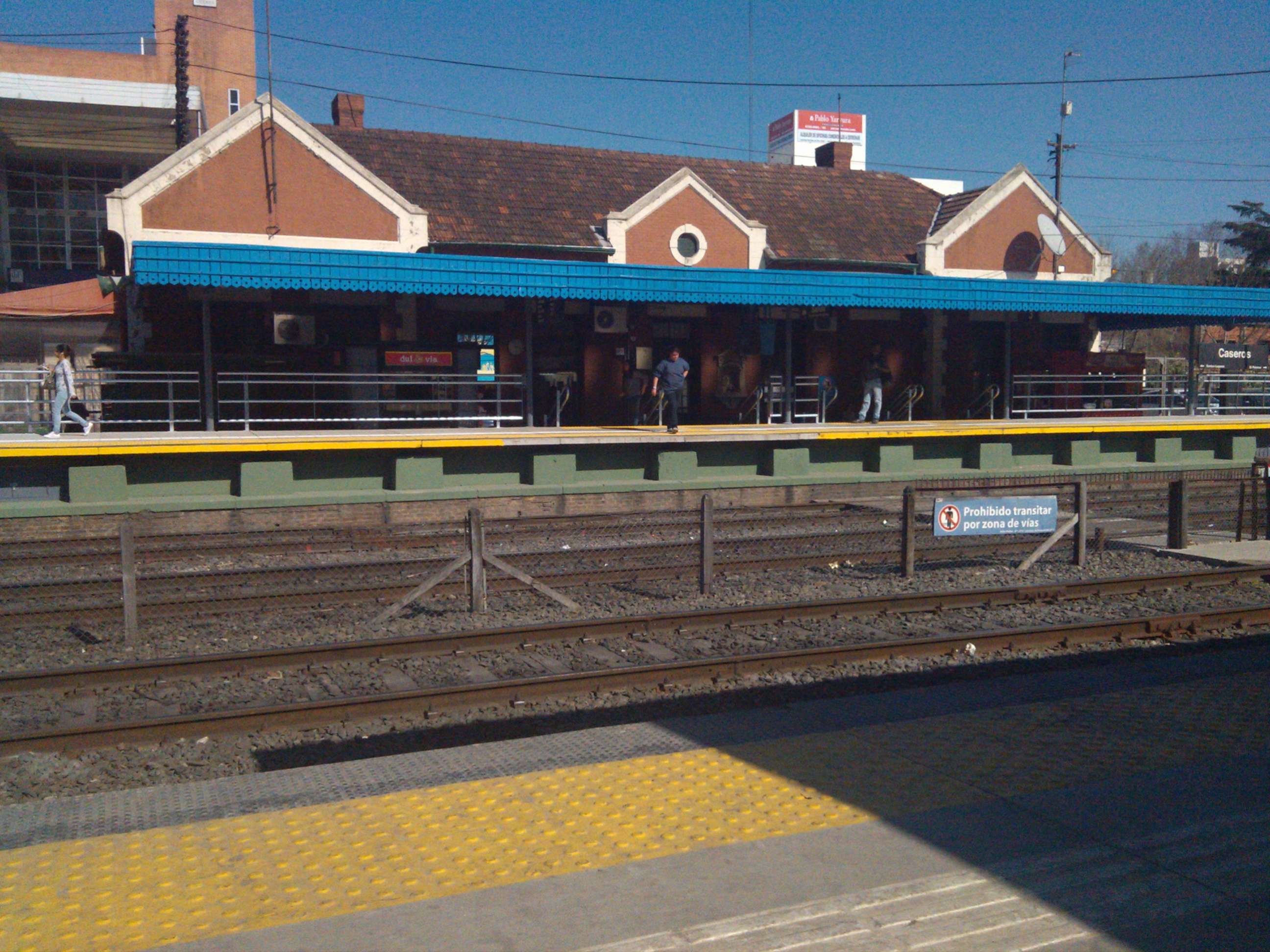 Imagen tomada desde el andén 2 hacia el andén 1 de la Estación Caseros con la obra de elevación de andenes culminada.